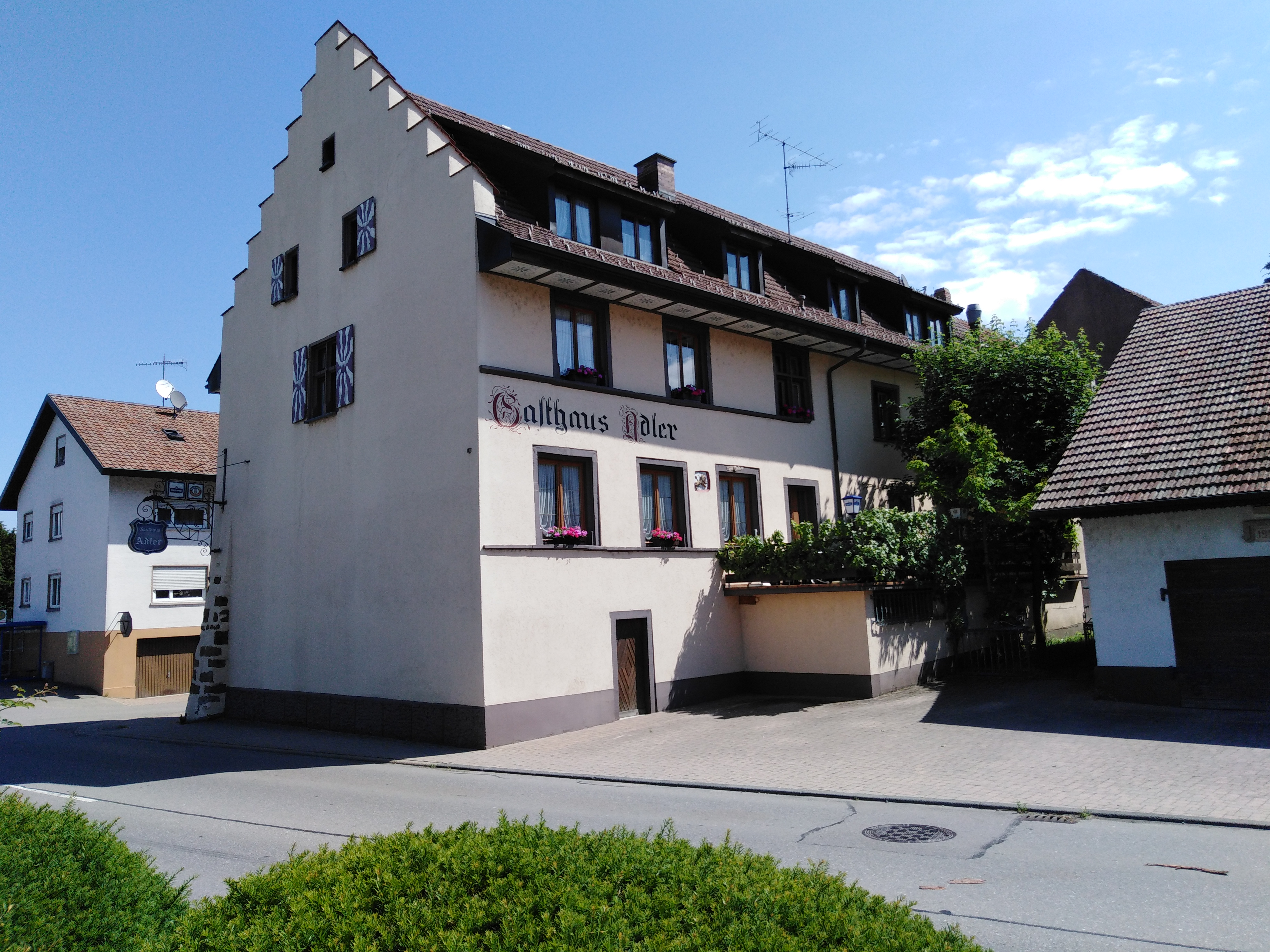 Gasthaus Adler in Lauchringen im Landkreis Waldshut in Baden-Württemberg. Ersterwähnung im Habsburger Urbar 1308. Ansicht Südwest-Seite.